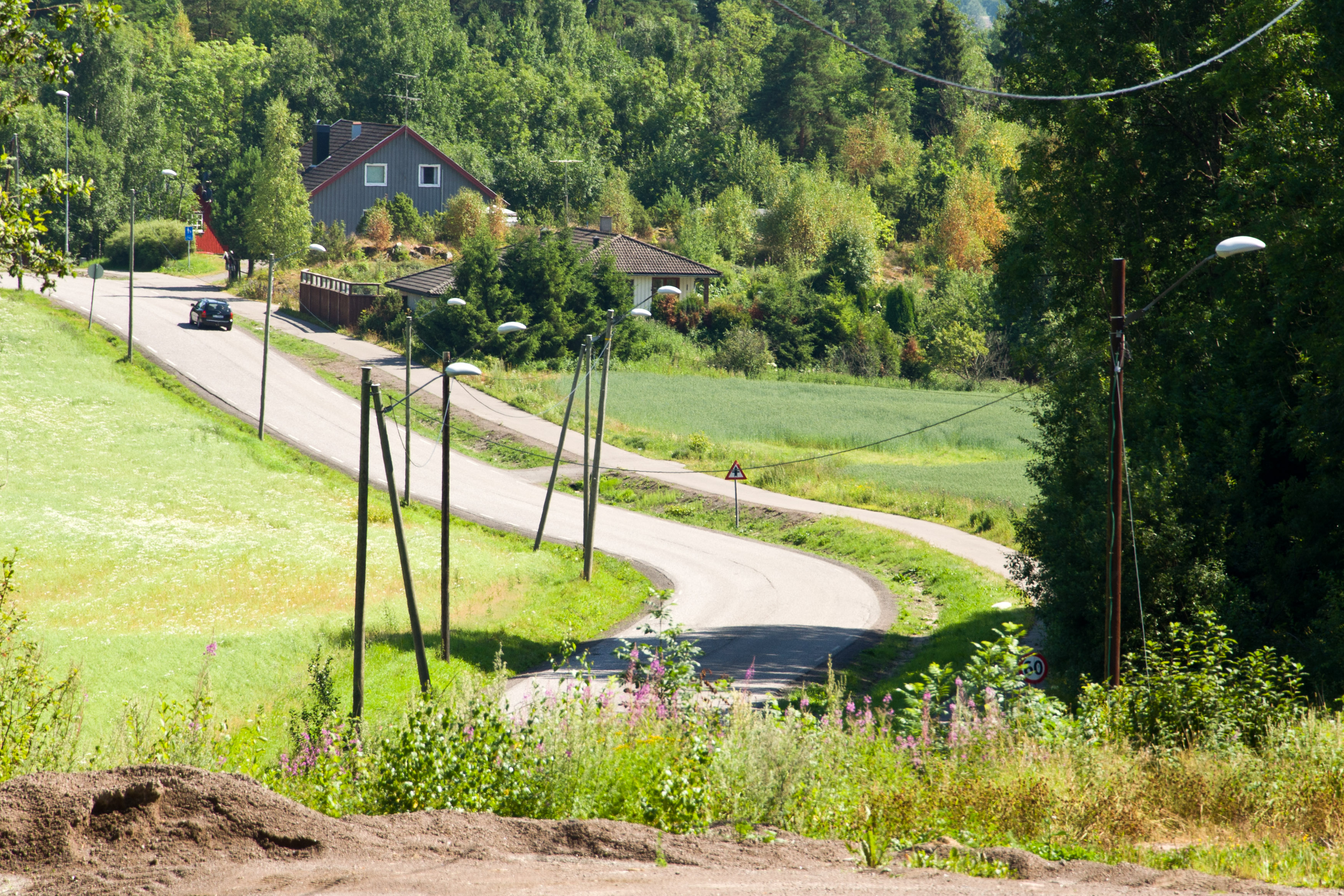 Fylkesvei 526 Taranrødveien i Tønsberg, Vestfold, Norge